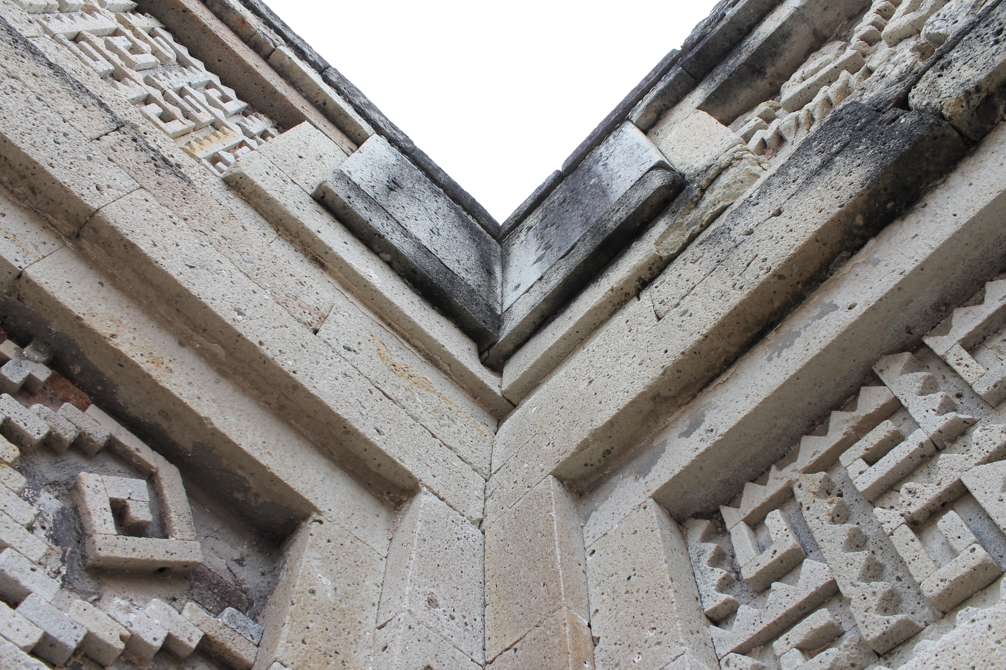 Se muestra un acercamiento donde es posible observar la forma en que están construidos los muros del Palacio ubicado en el Grupo de las Columnas. Los elementos que conforman los diferentes niveles de los muros se entrelazan entre sí en las esquinas.